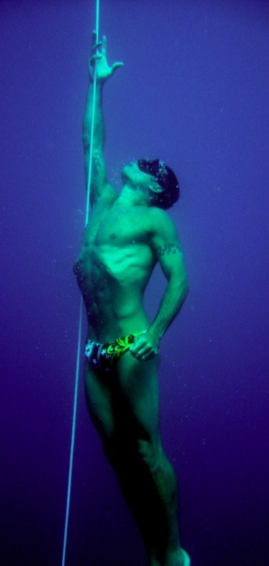 Nel golfo di squillace